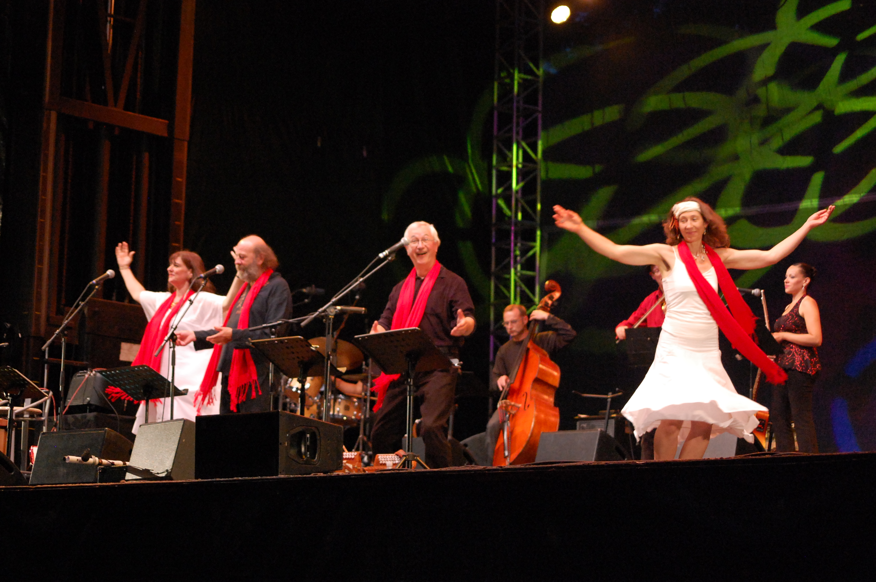 La troupe du spectacle Wurzle au Summerlied 2012, de gauche à droite : Isabelle LOEFFLER, Raymond ENGEL, Sylvain PIRON, Catherine Paira, Razika Djoudi